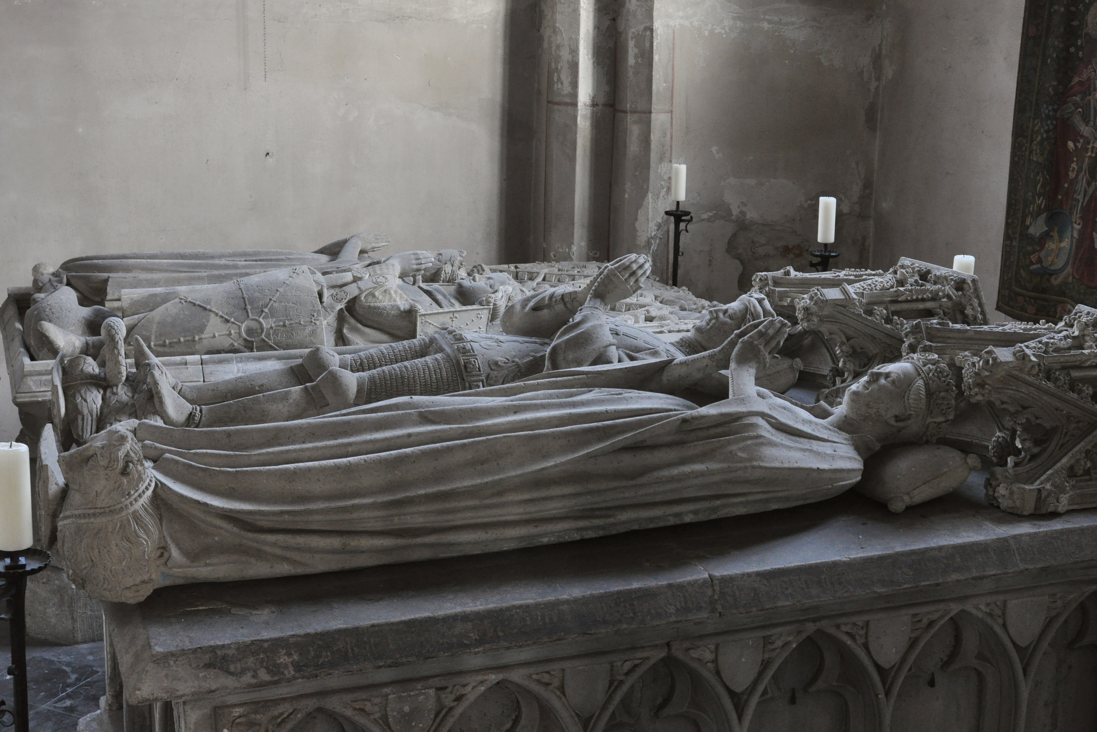 Doppelgrabmal des Grafen Adolph I (+1394) und seiner Gemahlin Margareta von Berg (+1425), Anfang 15. Jahrh. This is a photograph of an architectural monument.